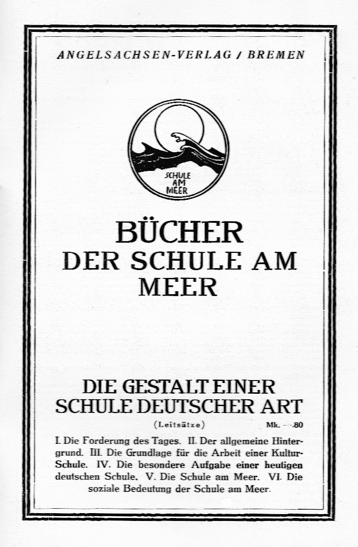 Titelblatt des Buches Die Gestalt einer Schule deutscher Art in der Reihe Bücher der Schule am Meer, 1924 erschienen im Angelsachsen-Verlag, Bremen. Es enthält die Leitsätze der Schule, in Abstimmung mit Rudolf Aeschlimann, Fritz Hafner und Dr. Paul Reiner, formuliert von Martin Luserke.